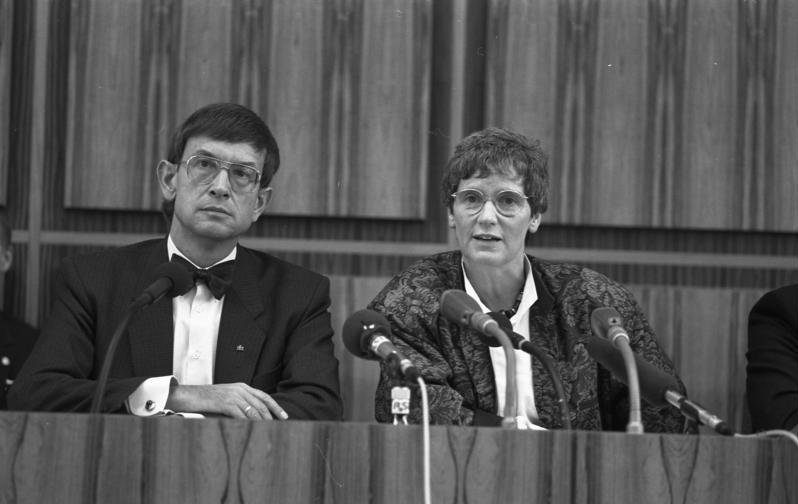 29.9.1987 Pressekonferenz mit Bundesminister für Forschung und Technologie Dr. Heinz Riesenhuber und Bundesministerin für Jugend, Familien, Frauen und Gesundheit Prof. Dr. Rita Süssmuth zur Tagung des Nationalen Aids-Beirats im Saal der Bundespressekonferenz.